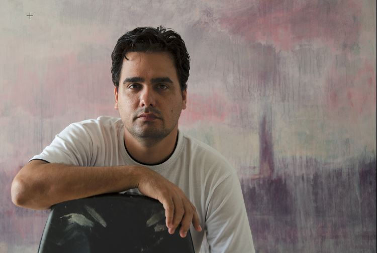 Artista visual Gabriel Sánchez Toledo.jpg